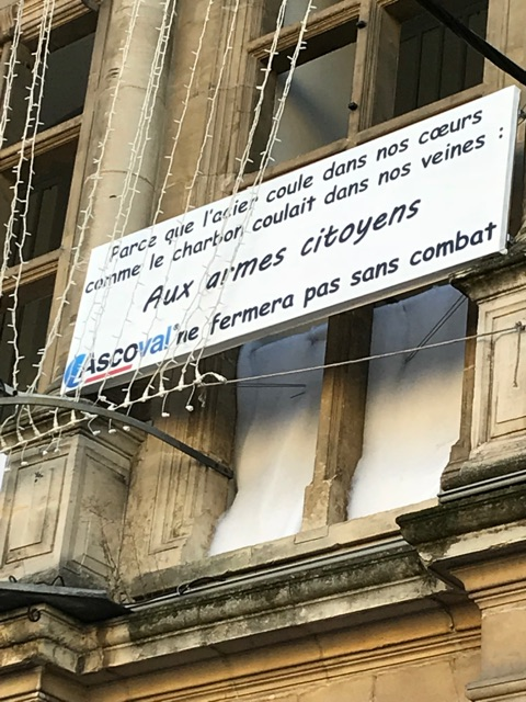 Panneau de soutien aux salariés de l'entreprise ASCOVAL sur l'hôtel de ville de Valenciennes